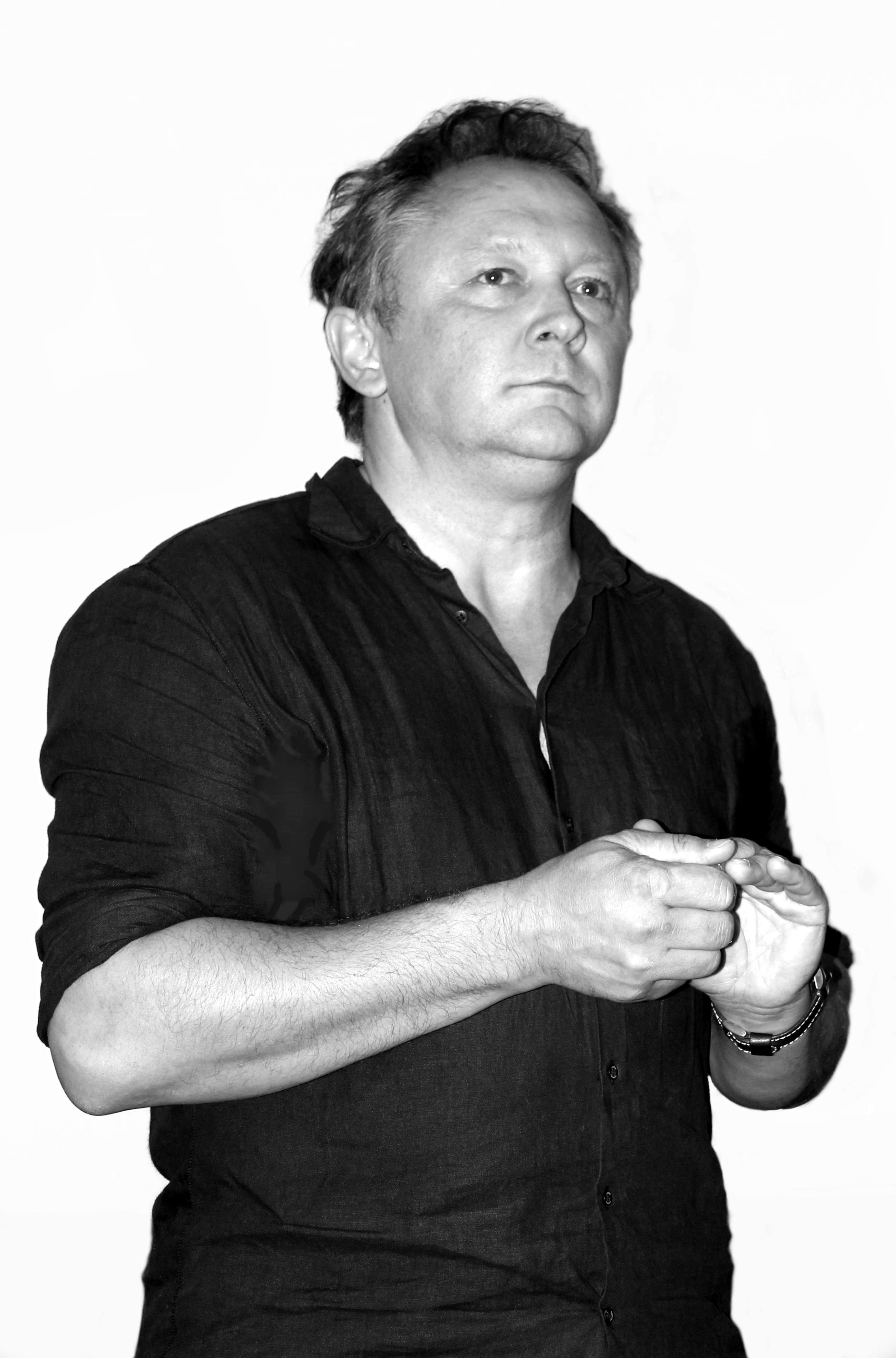 Stanisław Mucha (* 3. Mai 1970 in Nowy Targ, Polen) ist ein polnischer Dokumentarfilmregisseur und Buchautor, der in Deutschland lebt und arbeitet. Er dreht Filme über Europa und jenes, was für Europa gehalten wird. Aufnahme von 2018.